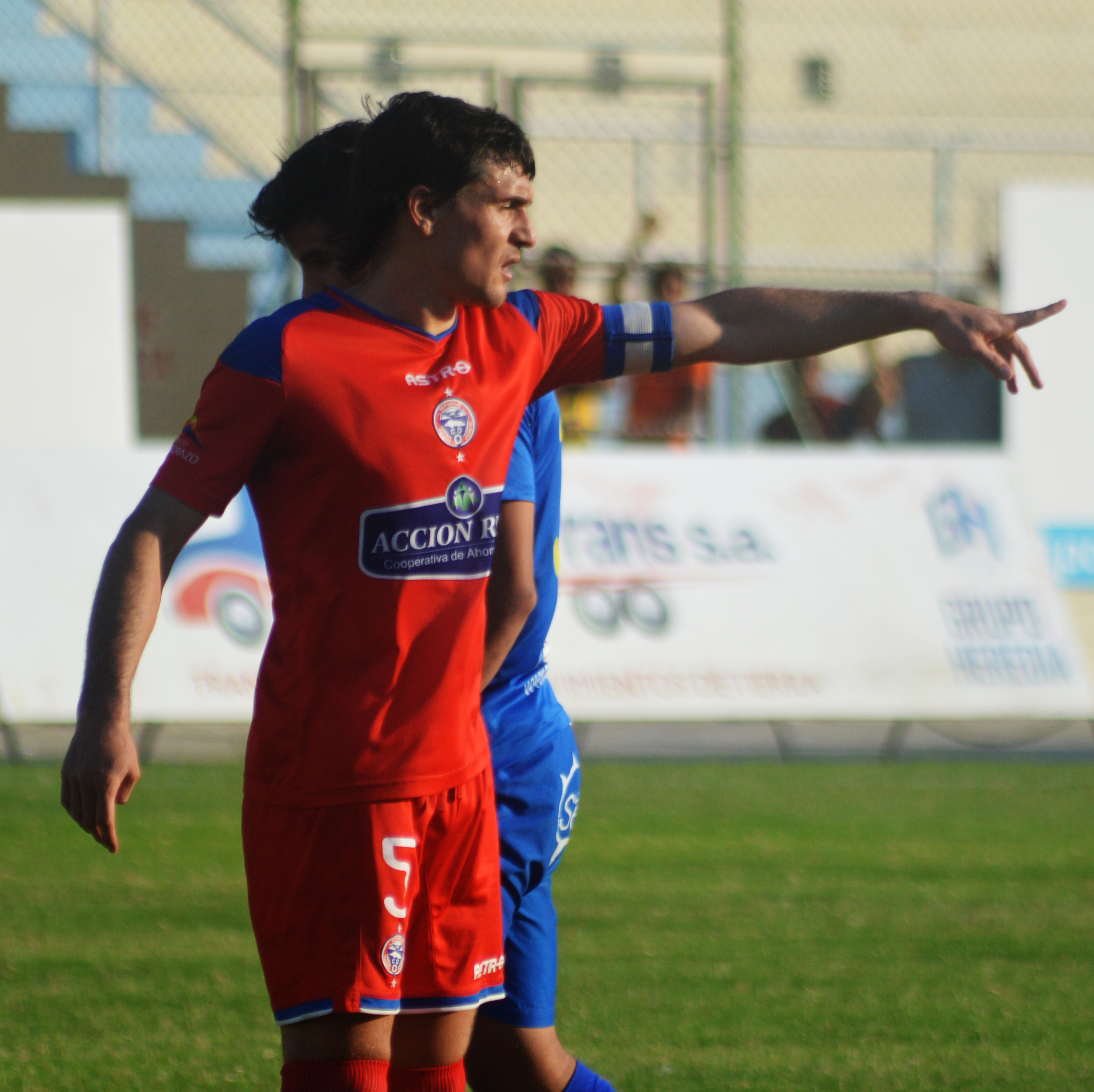 Armando Monteverde jugando en el Olmedo del 2015